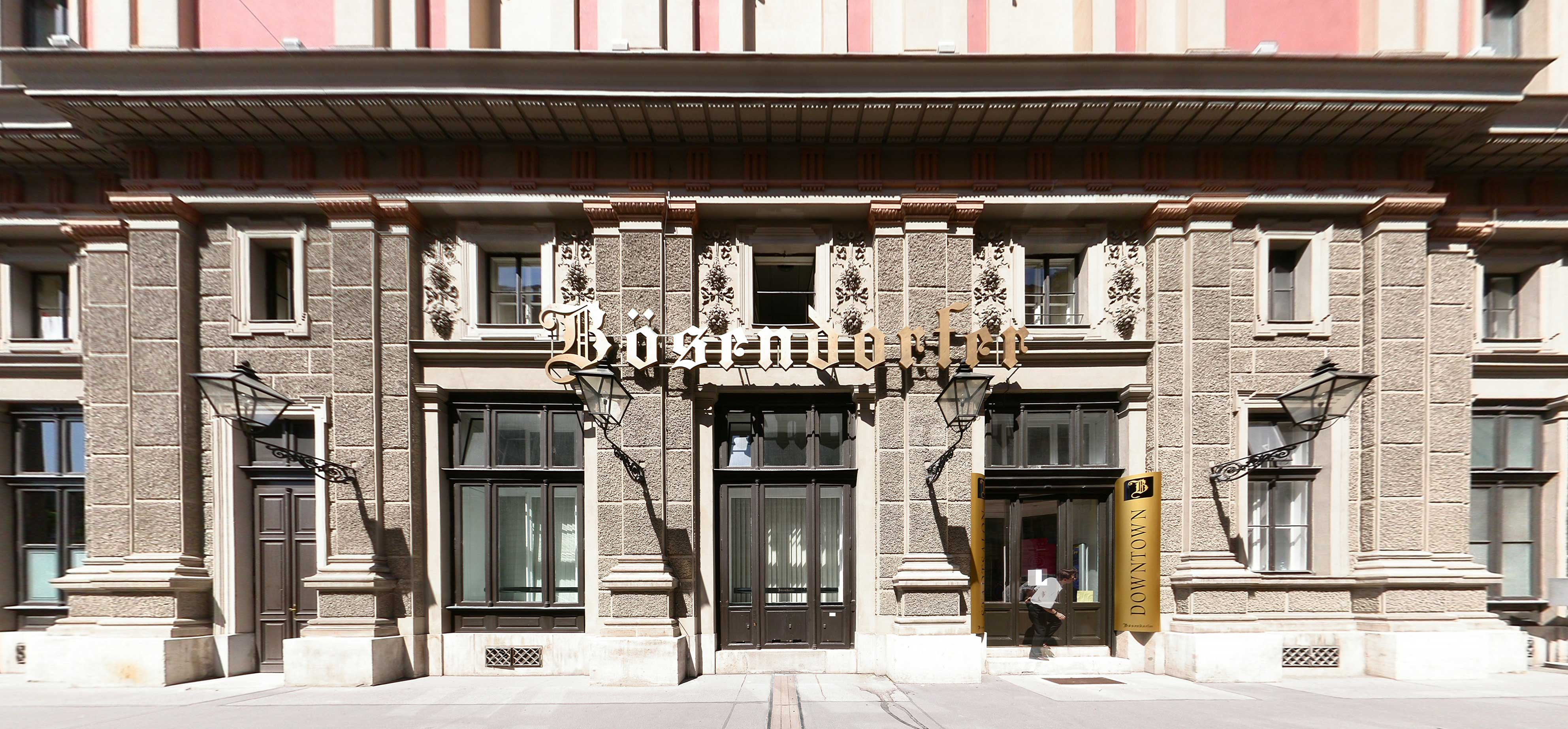 Schauraum der Fa. Bösendorfer von außenauf der Rückseite des Wiener MusikvereingebäudesFassade, Tag, Sommer, geschlossen, Blick in Richtung Westen